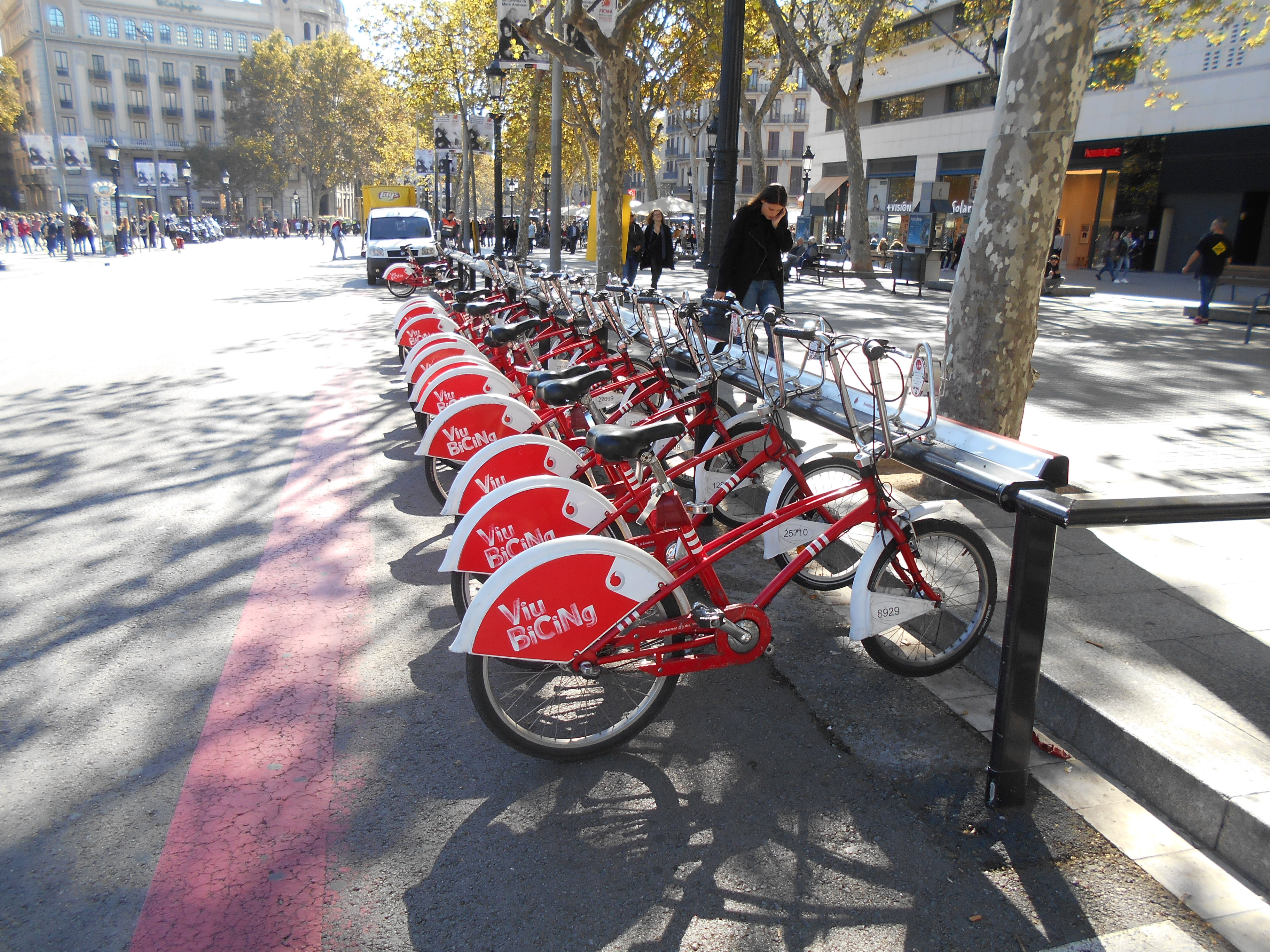 Parada de Bicing de la plaza Cataluña, Barcelona.